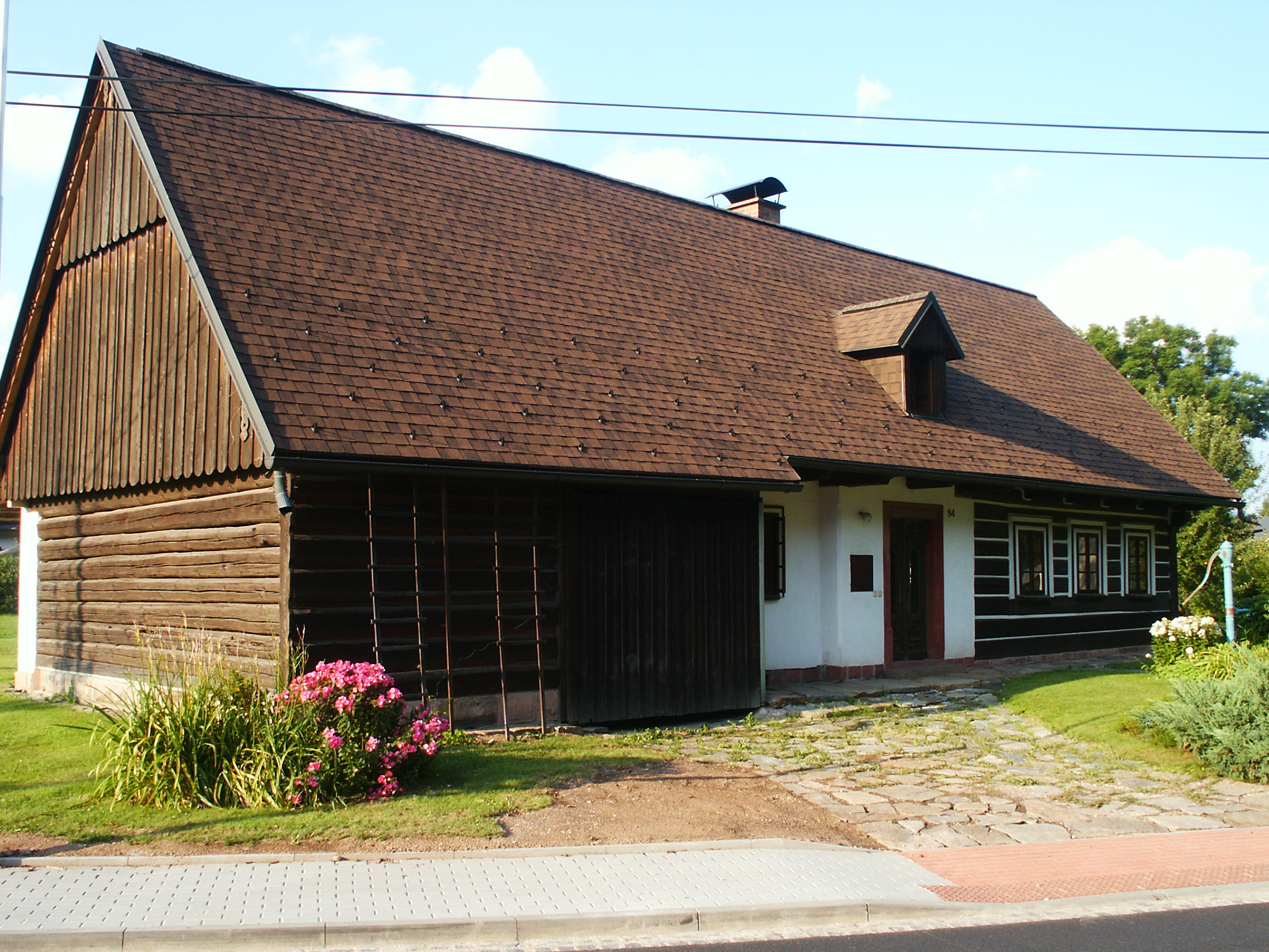 Dolní Branná - č.p. 84